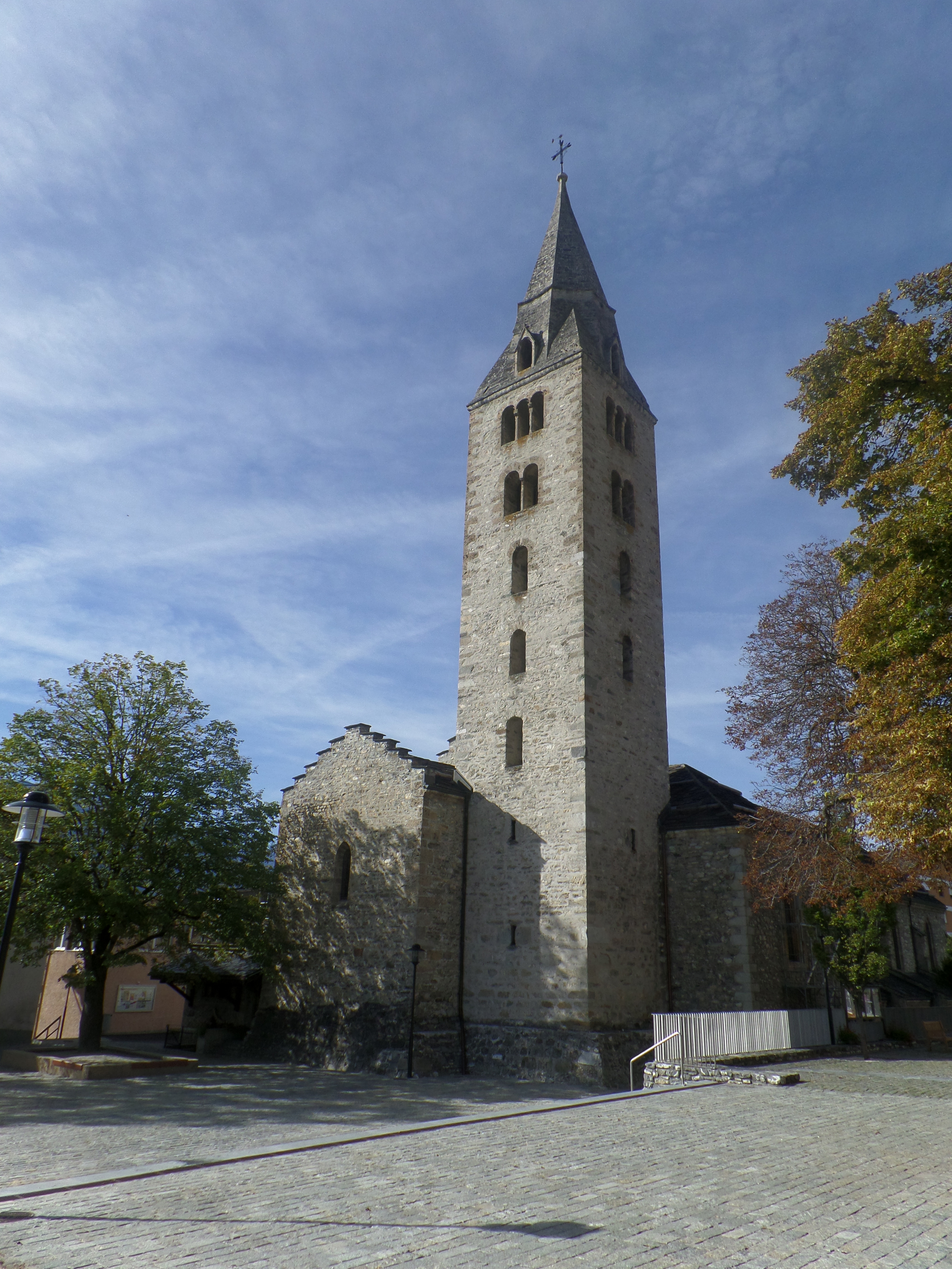 Pfarrkirche hl. Germanus in Savièse; Turm (um 1517) und Schiff (1523) wohl von Ulrich Ruffiner.